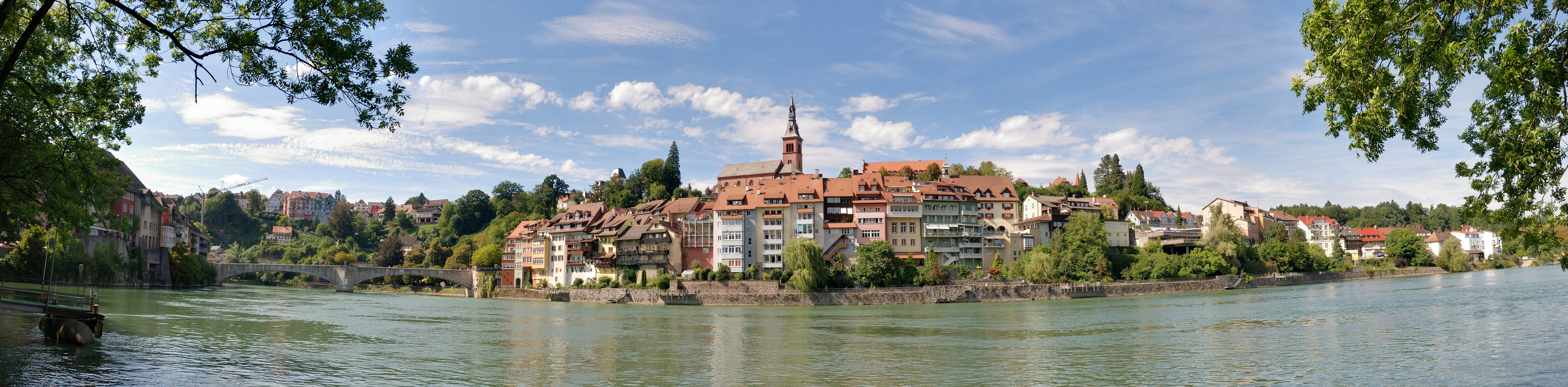 Panoramaansicht auf Laufenburg vom schweizerischen Rheinufer aus